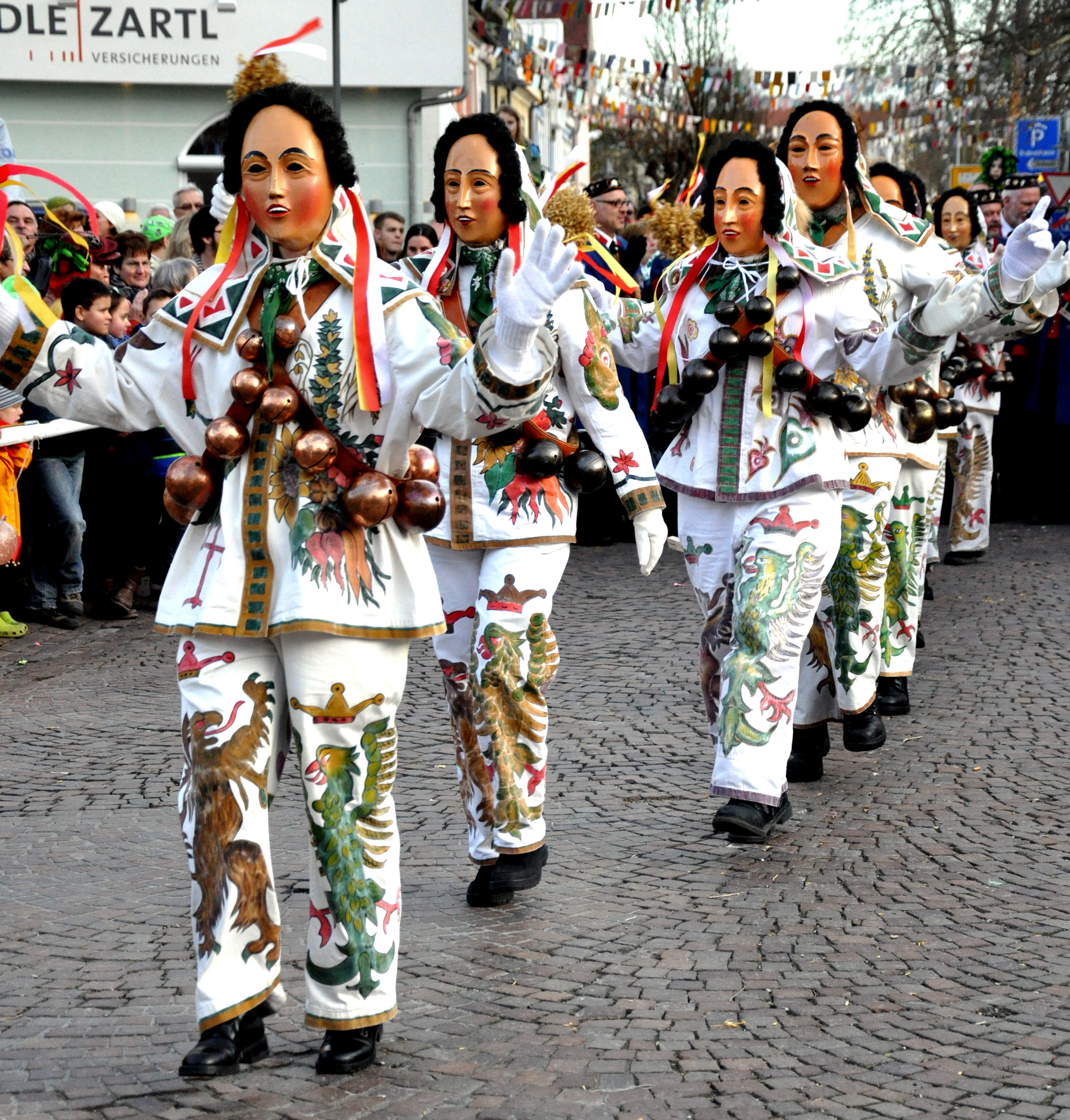 Narrenzunft "Grünwinkel 1858" e. V., Geisingen; Narrenfigur: Geisinger Hansel Fotografiert beim Landschaftstreffen der Vereinigung Schwäbisch-Alemannischer Narrenzünfte (VSAN) 2014 in Tettnang; Brauchtumsvorführungen am Samstag, 15. Februar 2014